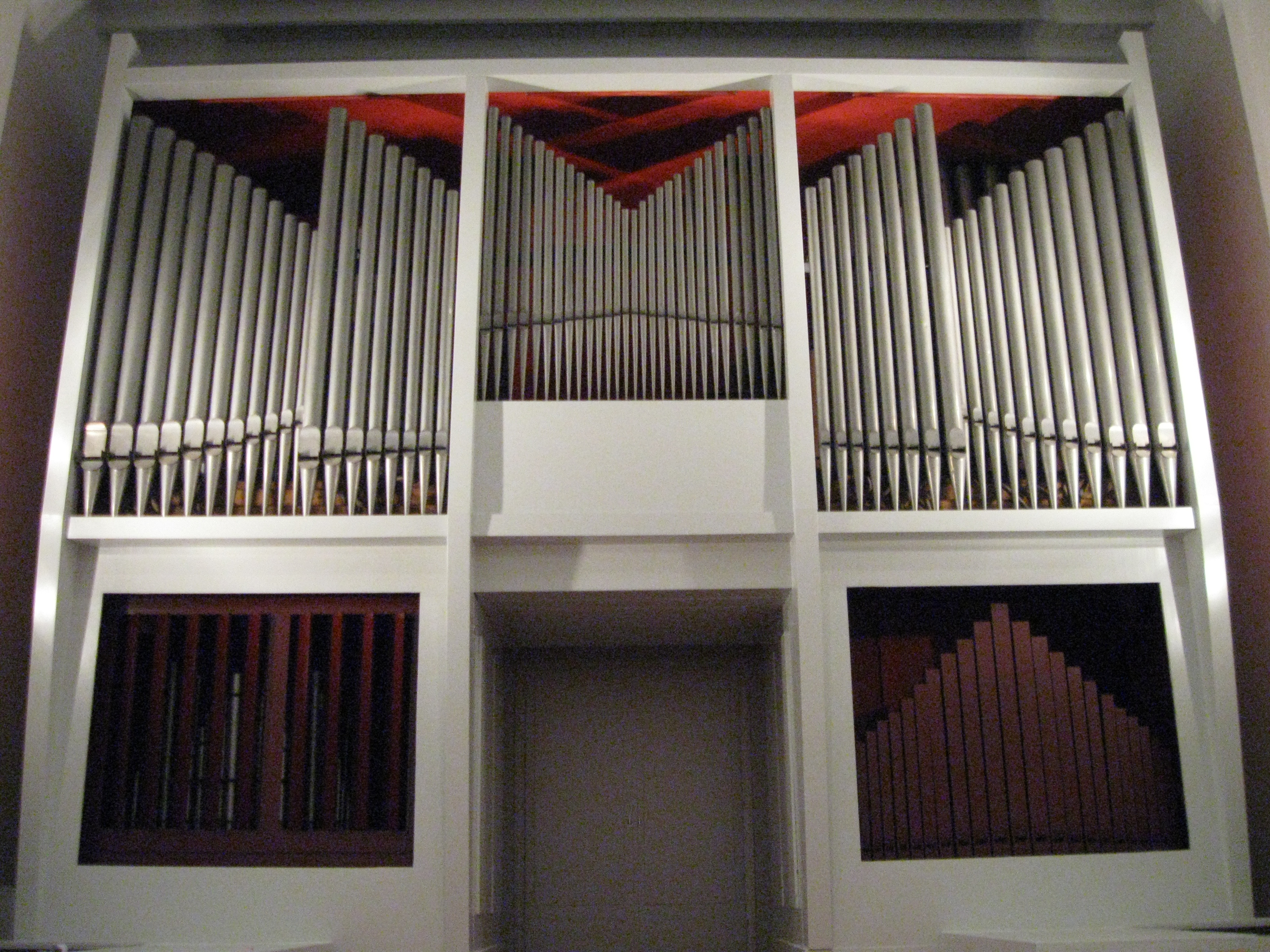 Die Walcker-Orgel (1957/58, III/31) in der St.-Josef-Basilika Lingen (Ems) nach der Generalüberholung mit überarbeitetem Prospekt im Dezember 2009. Unten Mitte: Durchgang zum Turm. Links unten: Geöffnetes Schwellwerk. Rechts unten: Positiv mit Gedacktpommer 8′ sichtbar. Oben: Hauptwerk und Pedal.